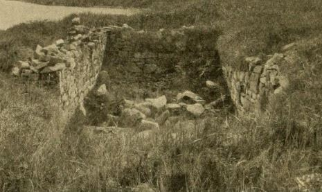 Vestiges de l'église d'Undir Hodfi,, à Vatnahverfi, vue depuis le côté ouest.